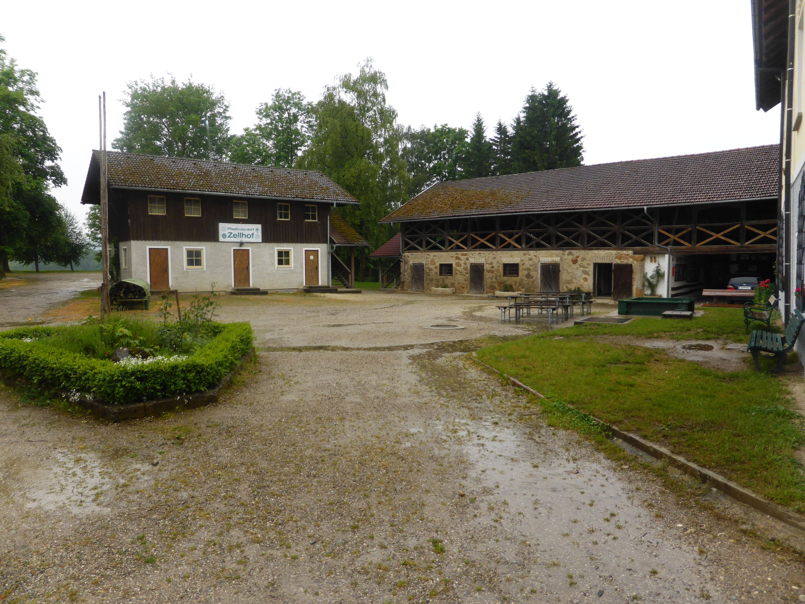 Gesamtanlage Zellhof